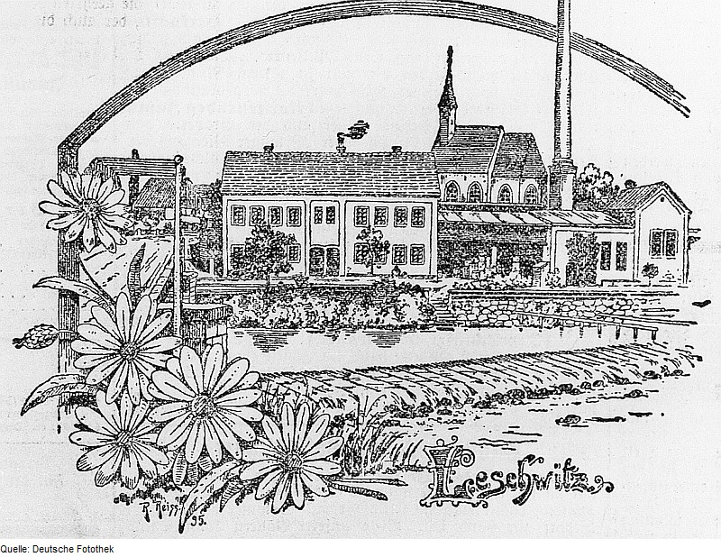 Original image description from the Deutsche Fotothek Görlitz-Weinhübel (bis 1936 Leschwitz). Ehem. Tuchfabrik, frühere Mühle, aus: Neuer Görlitzer Anzeiger vom 9.2.1896